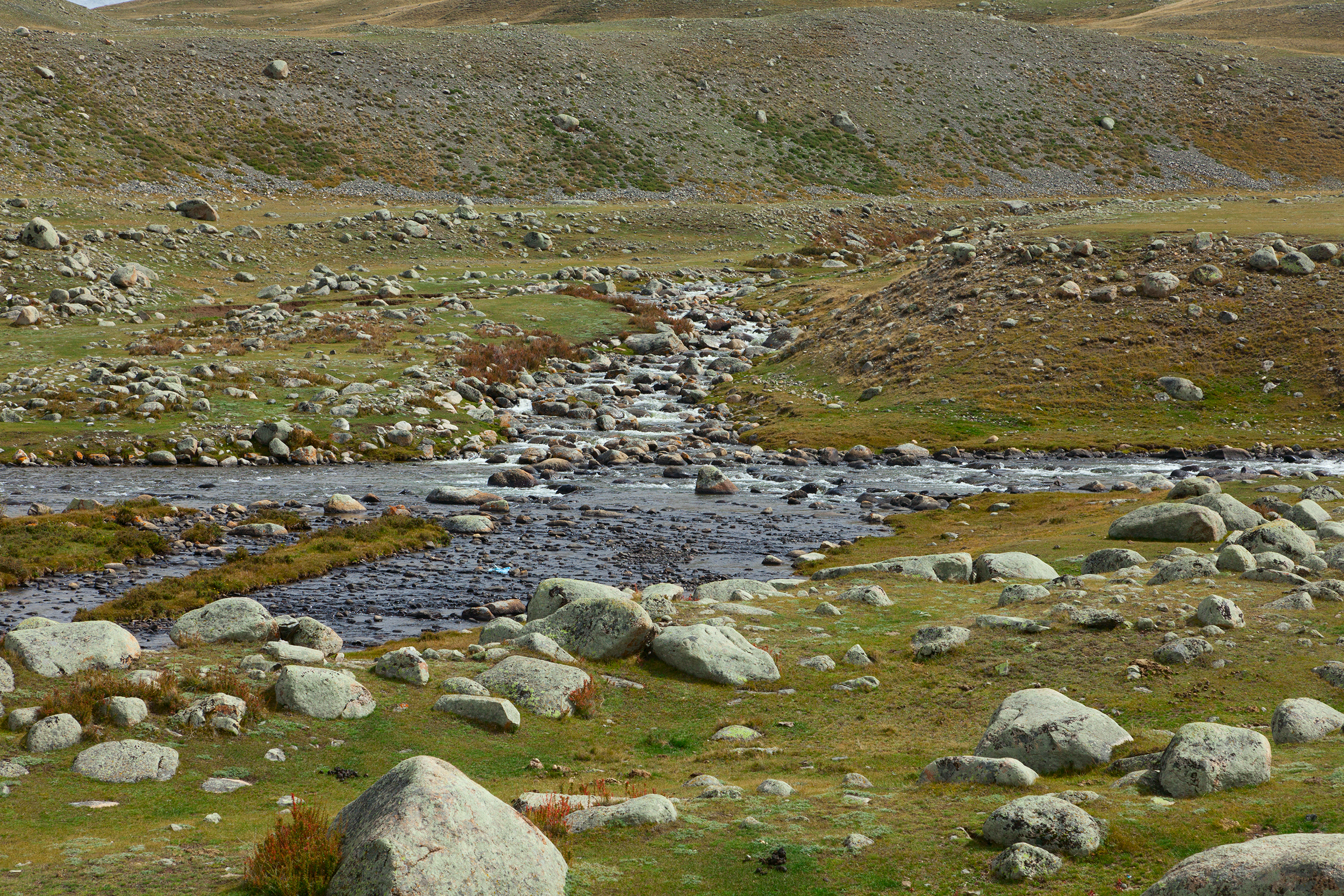 Богуты и Нарын-Гол, Начало реки Юстыт